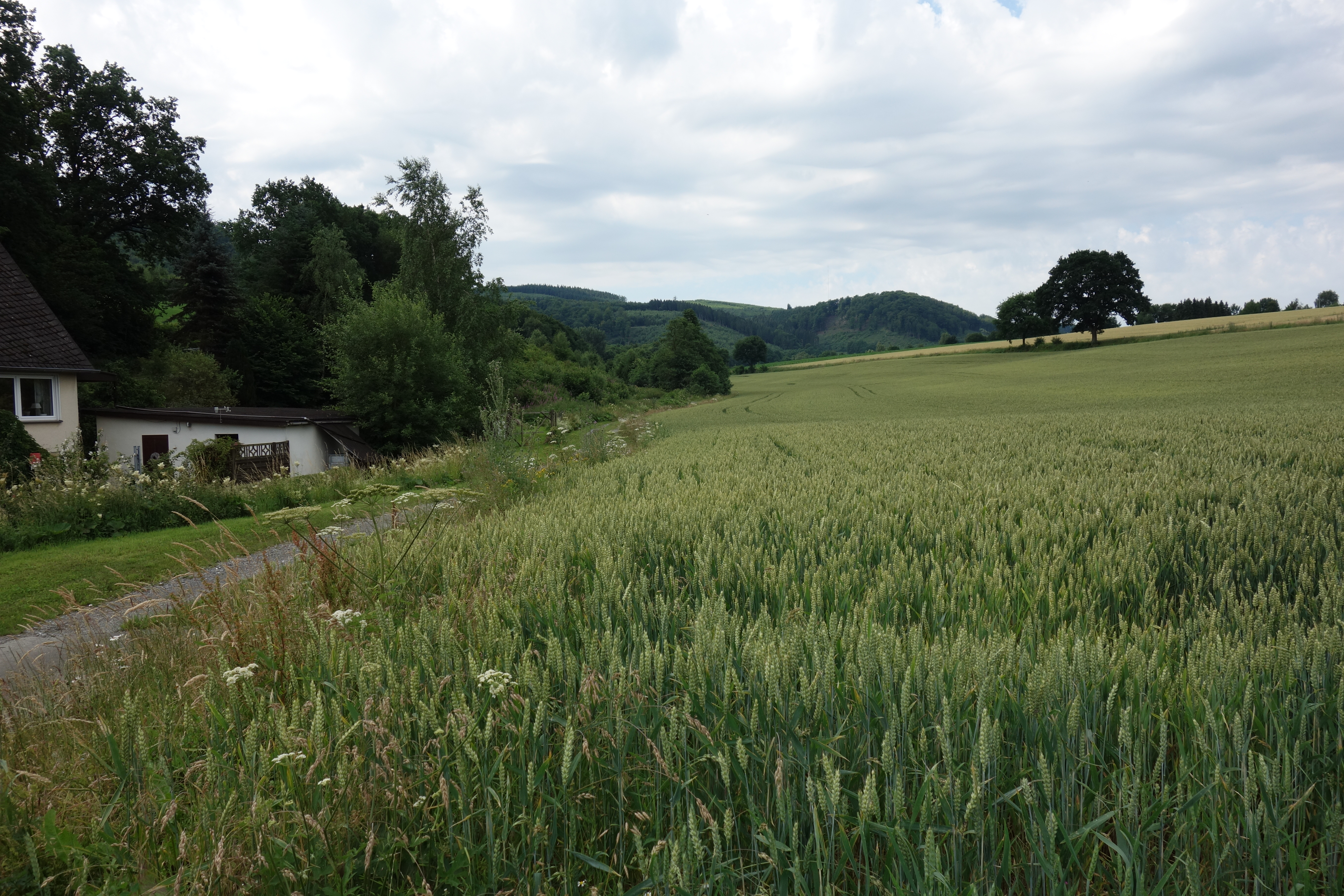 "Landschaftsschutzgebiet Talraum des Salmensiepen südlich Remblinghausen" von Norden aus, wobei das Haus, der Wald links und im Hintergrund zum LSG Meschede gehört. Das Wiesental-LSG wird illegal als Acker genutzt.